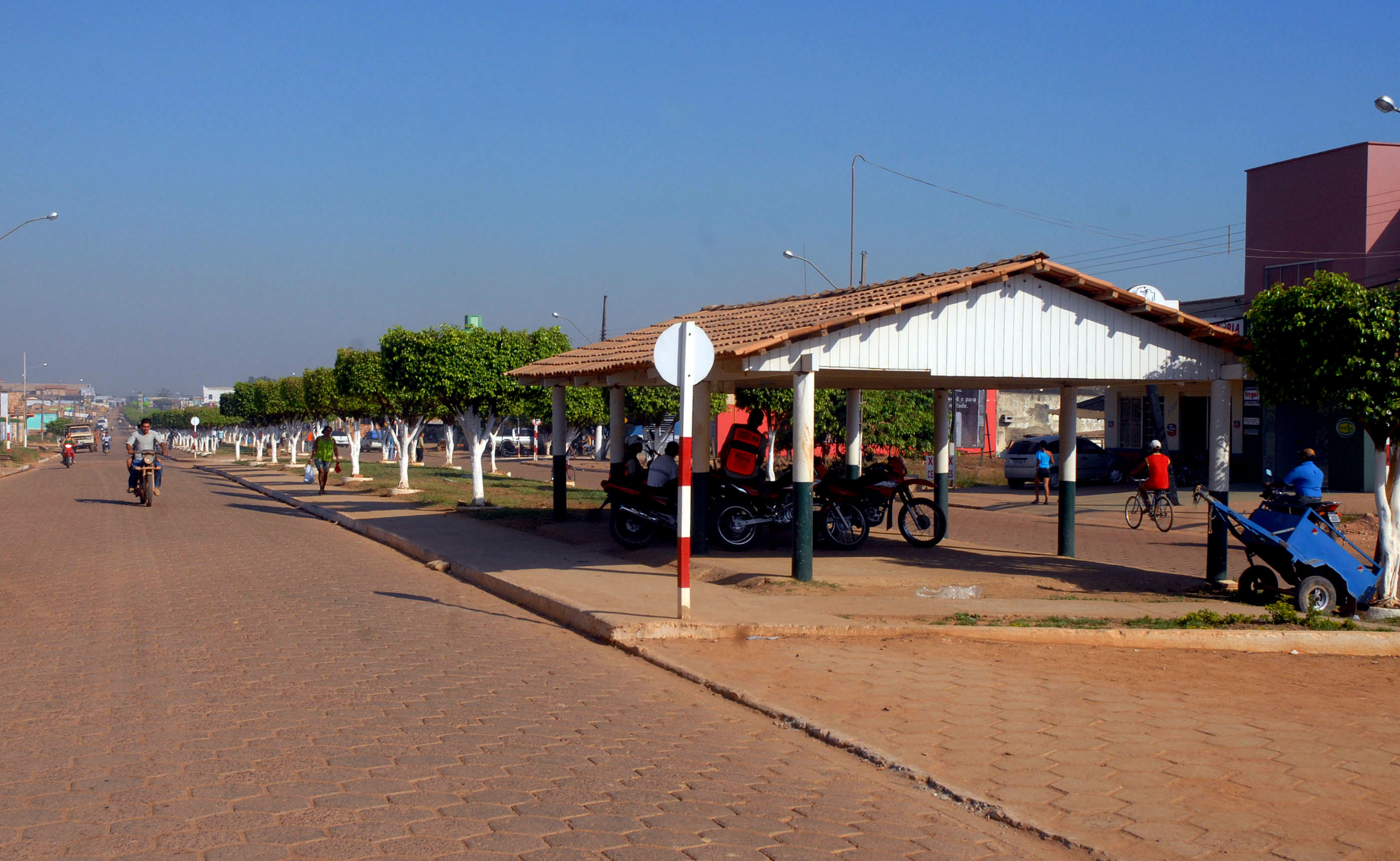 São Félix do Xingu (Pará) - Ruas da cidade.